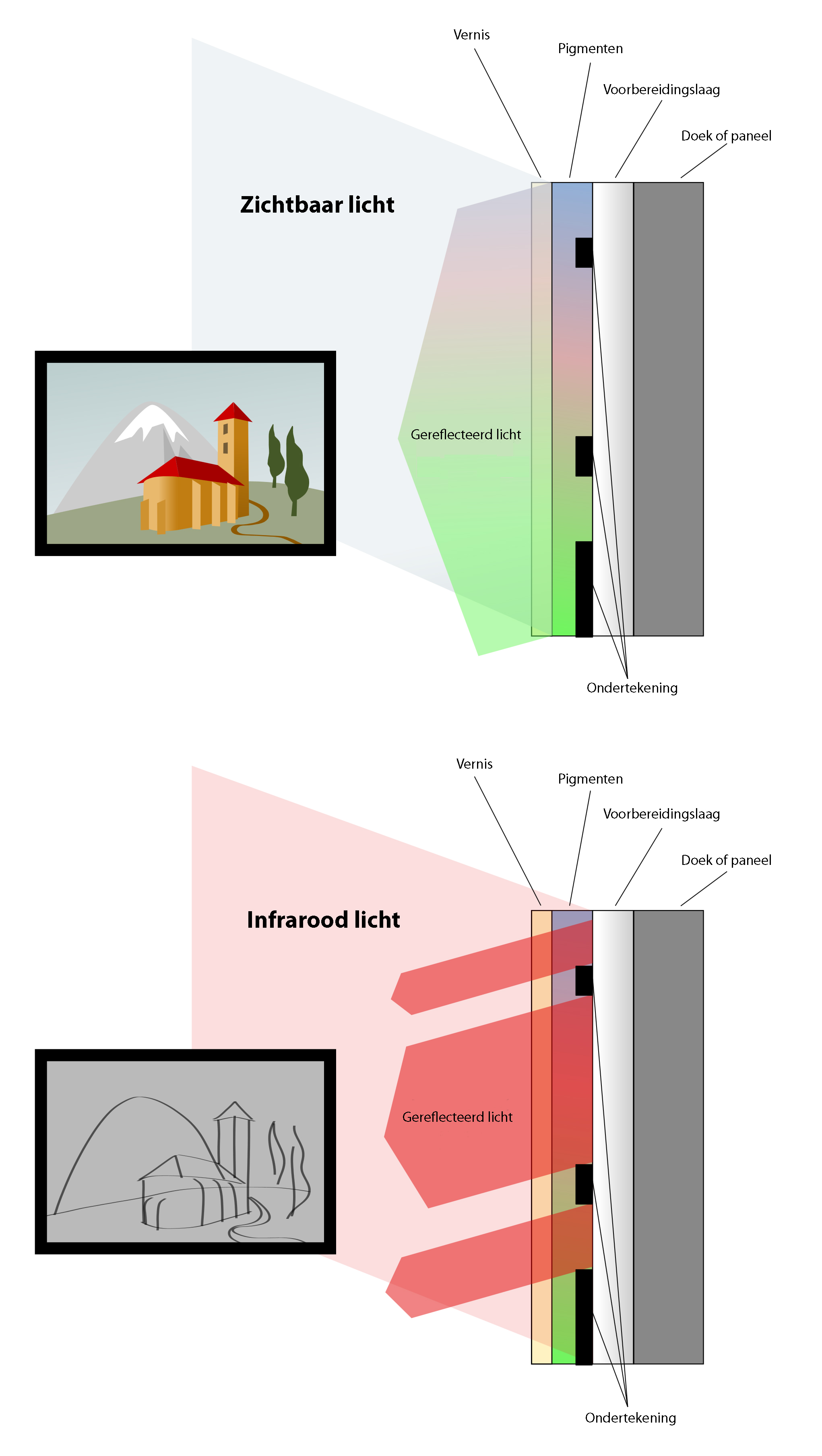 Schema dat de werking van infraroodreflectografie verklaart